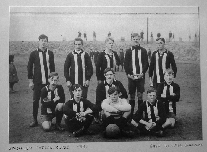 Kretsmesterne på Romerike 1912 og 1913 avbildet på Hesteryggen Arena (ved Jenseberget) høsten 1913.